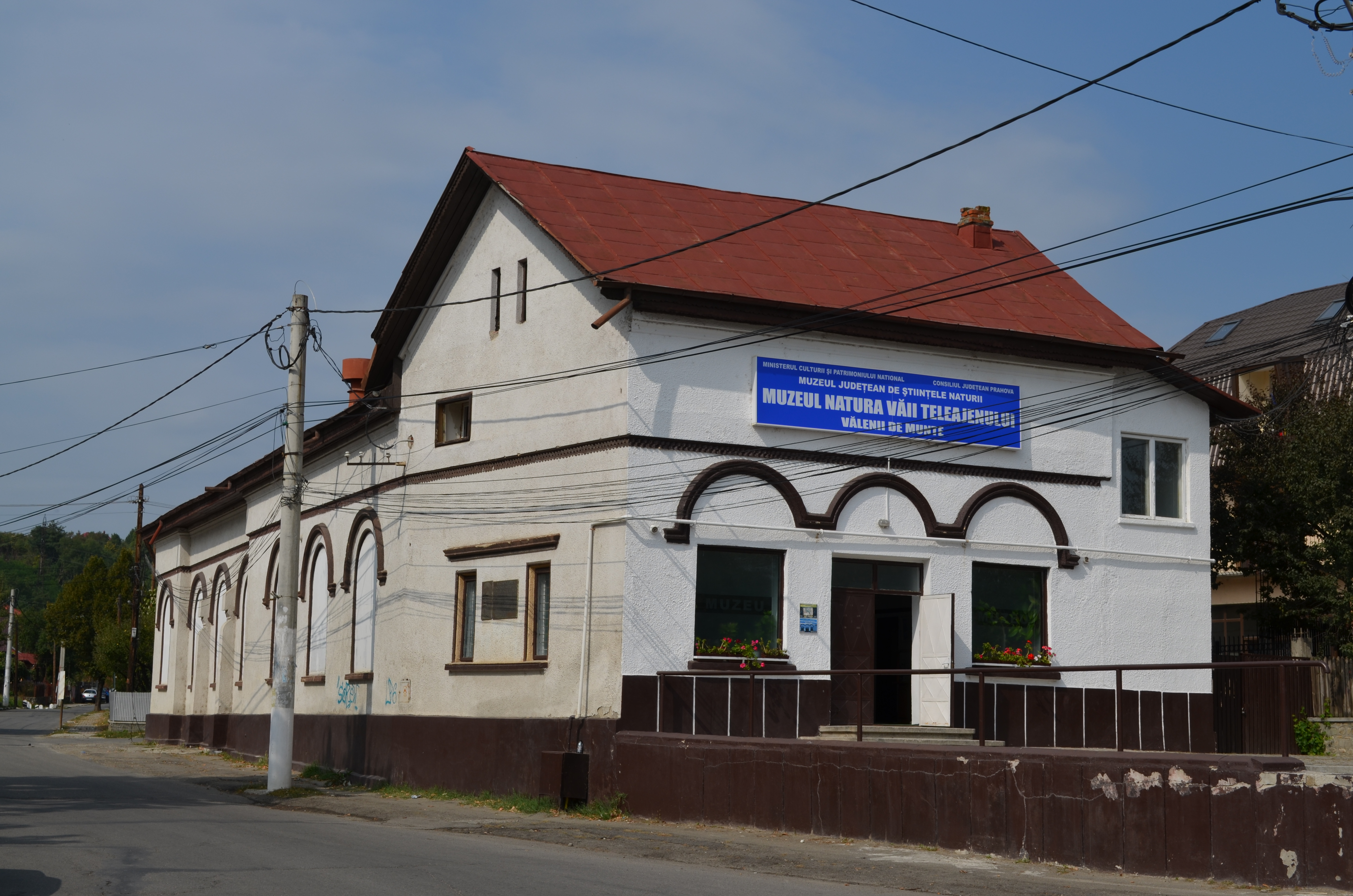 Muzeul Natura Văii Teleajenului, sediul fostei Universități Populare "Nicolae Iorga"